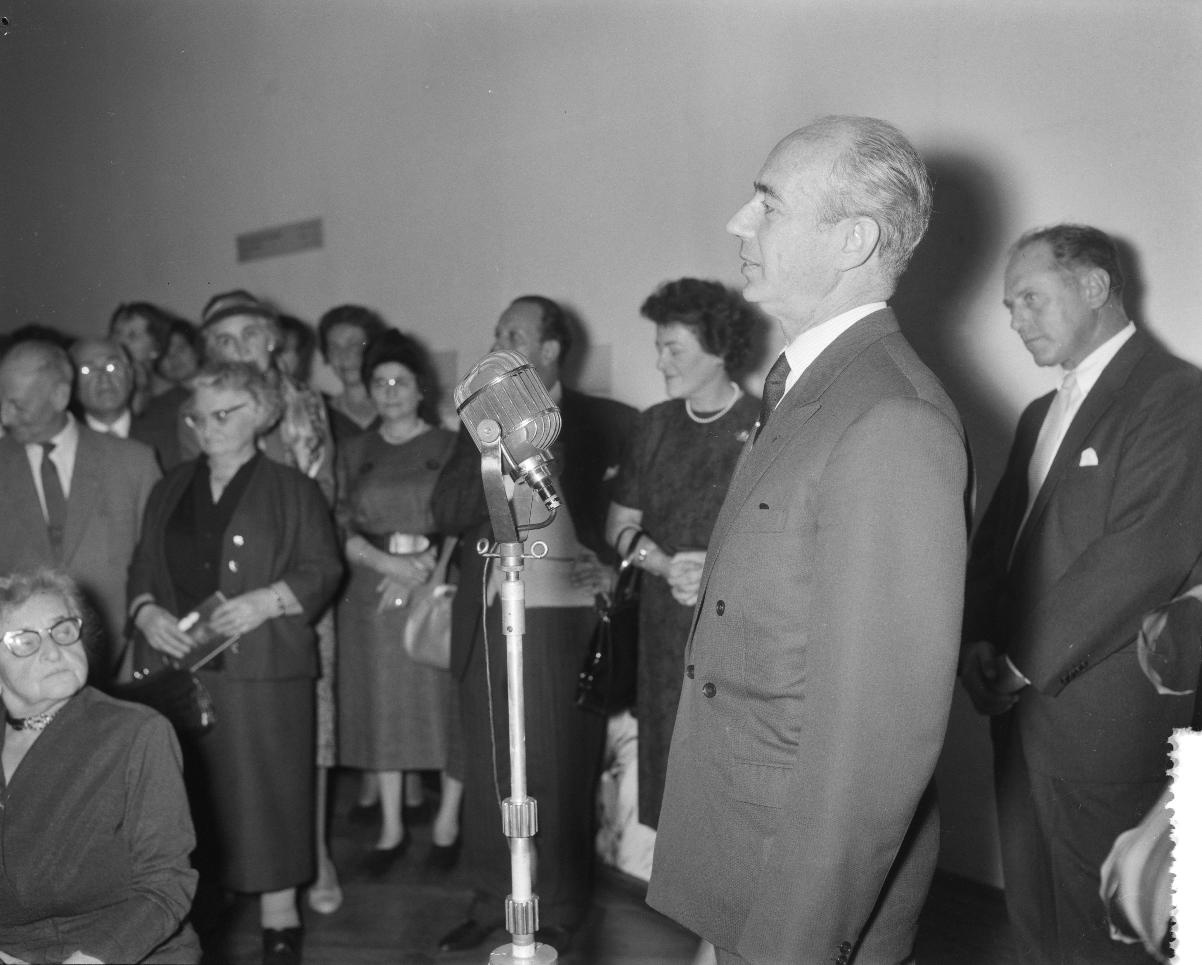 Collectie / Archief : Fotocollectie Anefo Reportage / Serie : [ onbekend ] Beschrijving : Opening tentoonstelling "Vrouwen van Israel" door ambassadeur Cidor, ambassadeur H. A. Cidor tijdens spee Datum : 2 november 1960 Trefwoorden : Openingen, ambassadeurs, speeches, tentoonstellingen Persoonsnaam : H. A. Cidor Instellingsnaam : Vrouwen van Israël Fotograaf : Bilsen, Joop van / Anefo Auteursrechthebbende : Nationaal Archief Materiaalsoort : Negatief (zwart/wit) Nummer archiefinventaris : bekijk toegang 2.24.01.04 Bestanddeelnummer : 911-7308